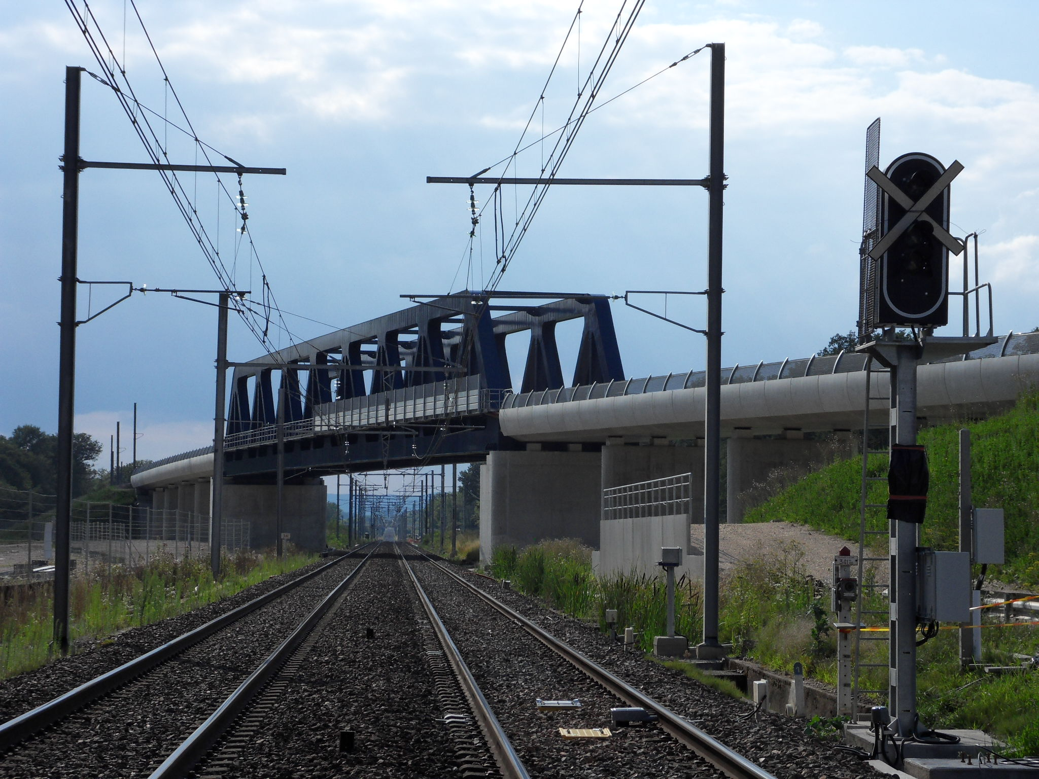 LGV Rhin-Rhône. Ouvrage de franchissement des voies Dijon-Dole. La voie 2 du TGV franchit les voies Dijon-Dole entre Villers-les-Pots et Collonges au km 340,900 de la ligne Dijon-Dole et rejoint la voie 2. Les caténaires ne sont pas encore déroulées au-dessus de la voie. Les signaux de protection de la bifurcation ne sont pas encore en service.